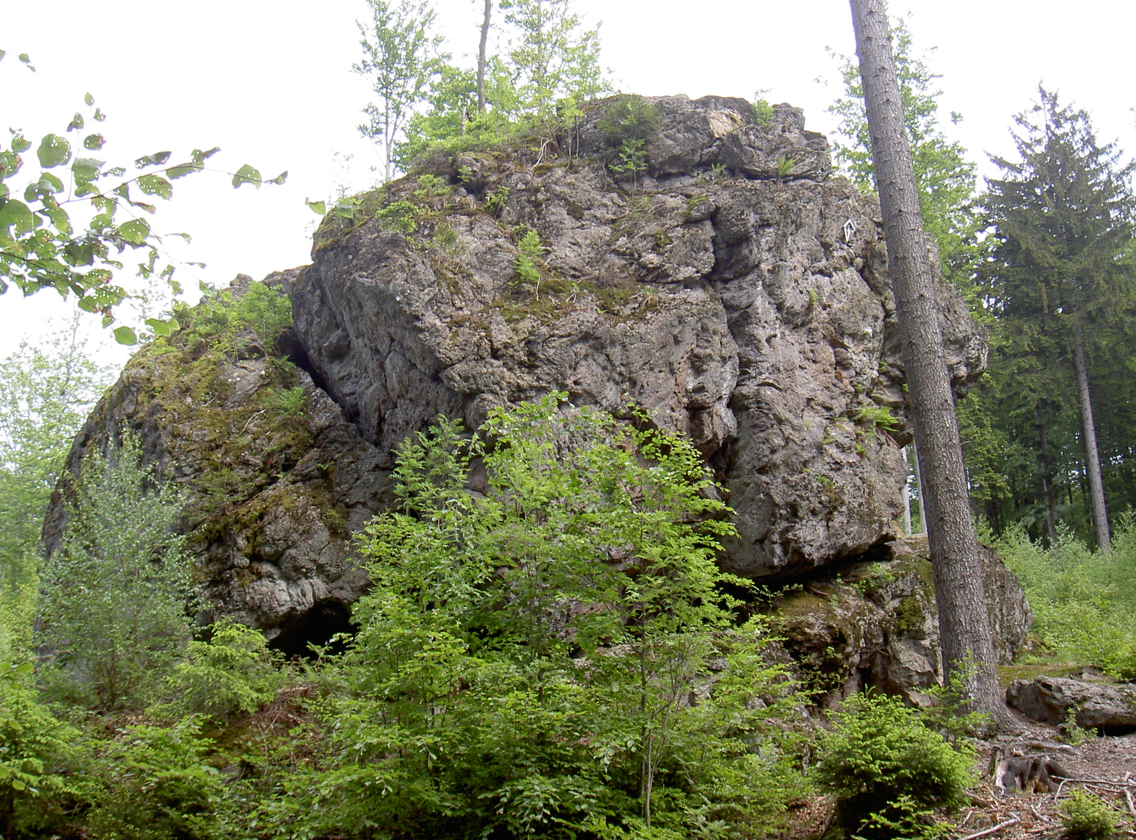 Geotop Einsiedlerfels bei Pucher